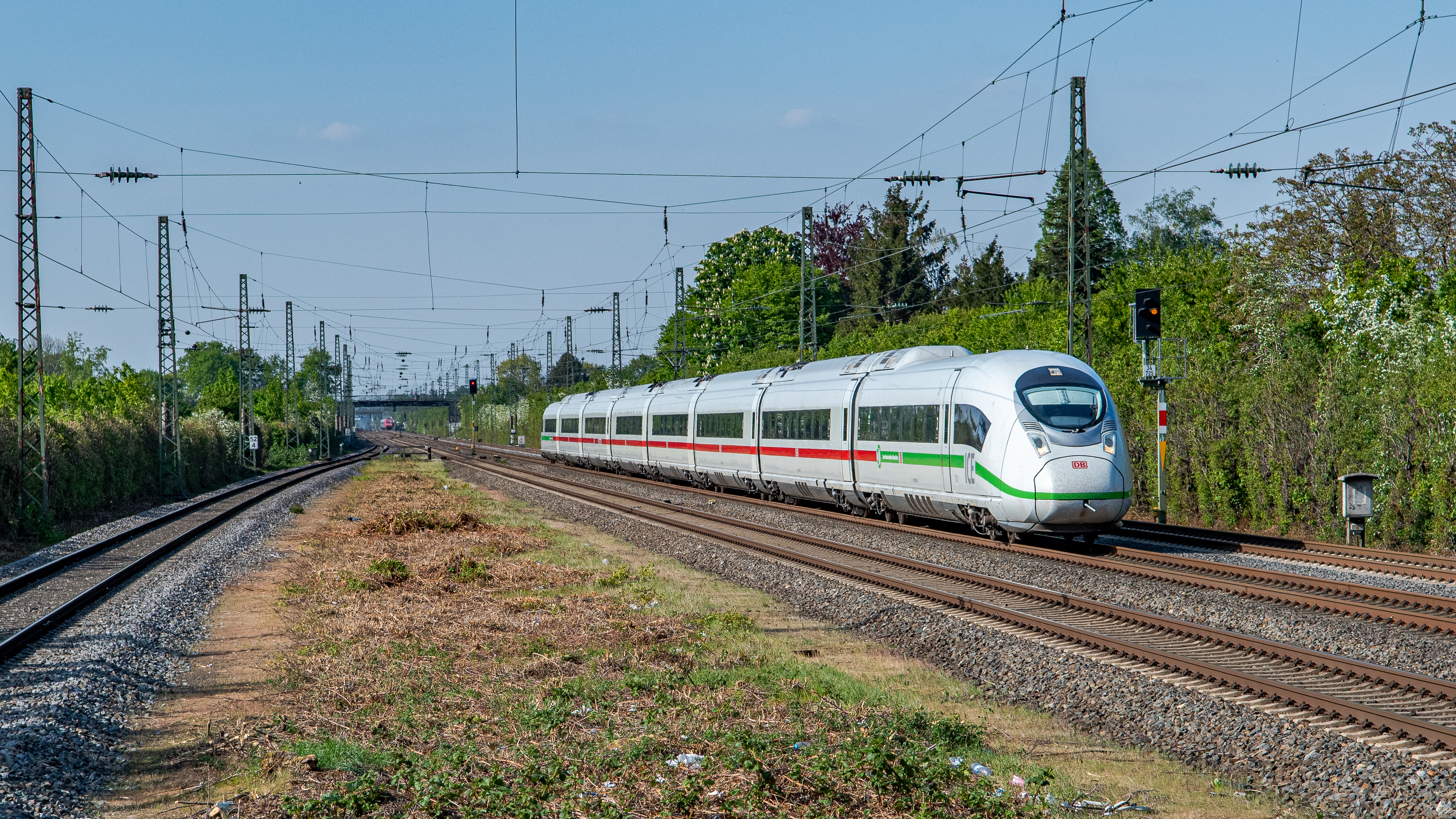 Op het Fernbahn gedeelte tussen Duisburg en Düsseldorf, bij Angermund, waar 200 km/h mag worden gereden rijdt DB Fern Velaro 407 002. De trein is onderweg als ICE 727 van Dortmund Hbf naar München Hbf